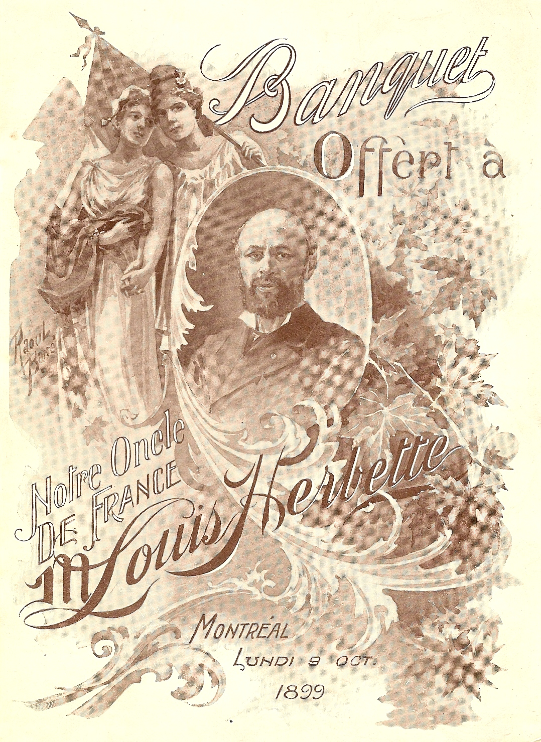 Couverture du menu de banquet offert à "notre oncle de France" Montréal 1899.